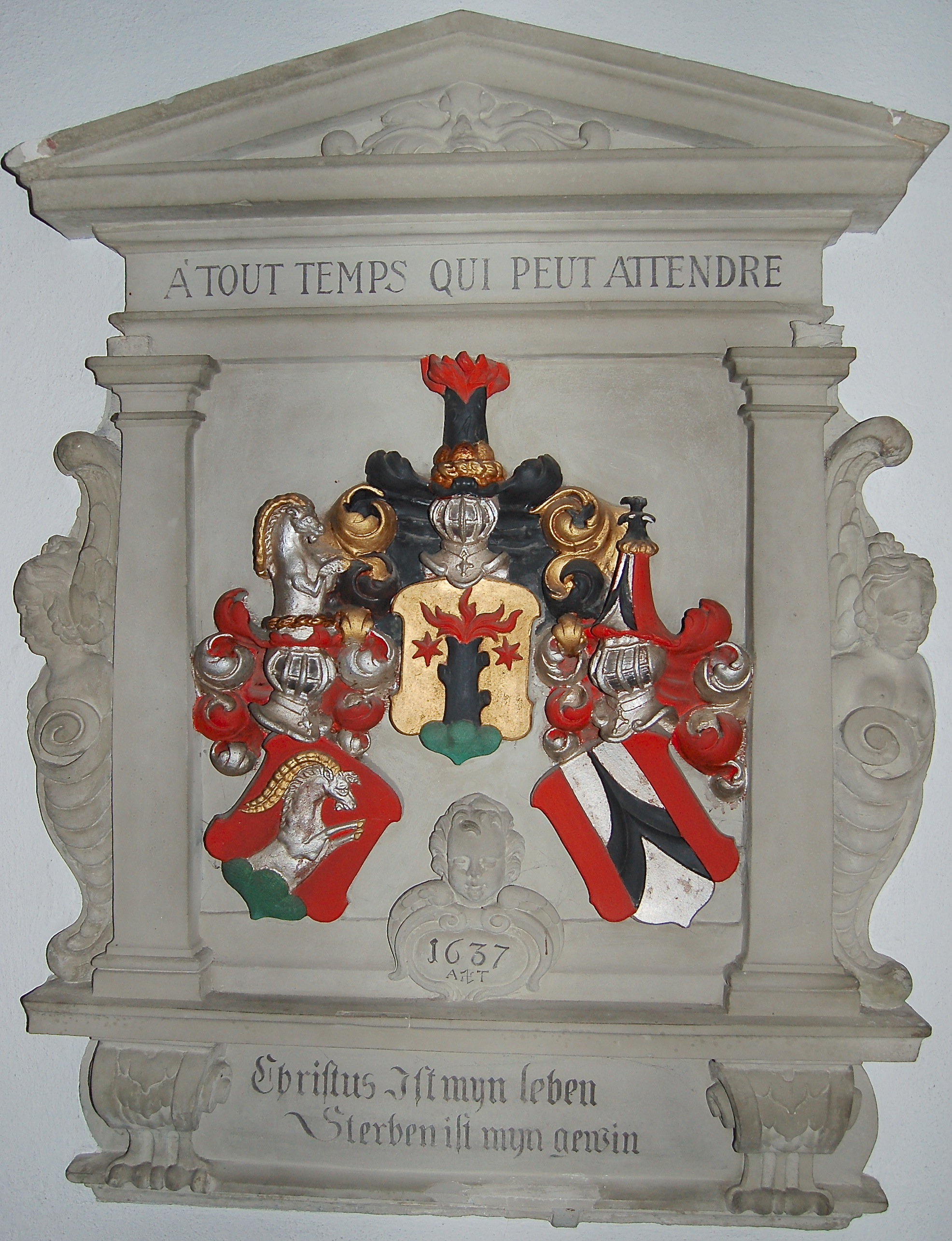 Das Epitaph mit dem Familienwappen von Franz Ludwig von Graffenried (1600 - 1661) und den Wappen seiner vor ihm verstorbenen Gattinnen, Magdalena Steiger und Helena von Erlach ist in die Südwand des Chors der Kirche Gerzensee eingelassen.